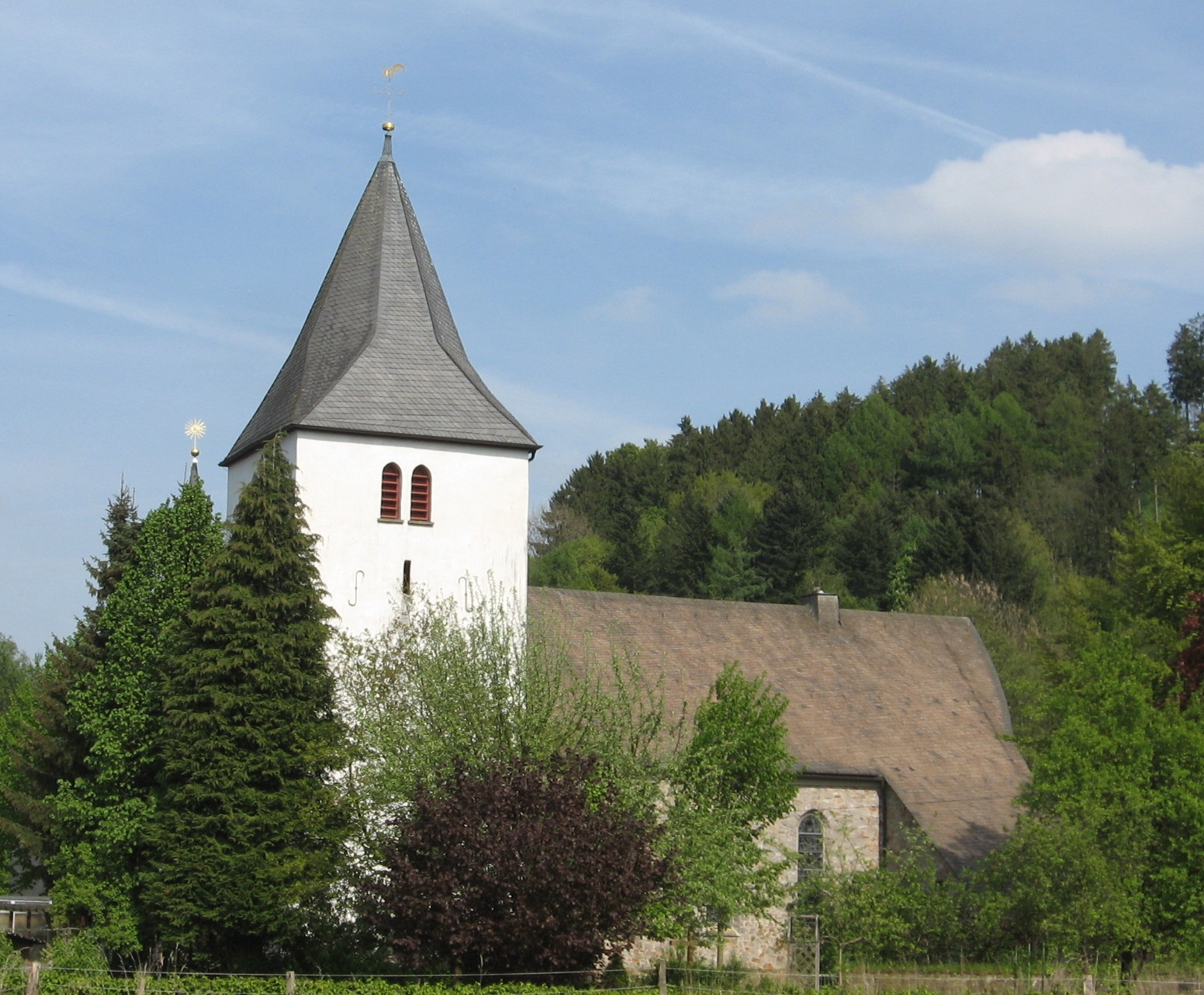 Kirche St. Antonius Einsiedler in Sundern-Allendorf von Süden.